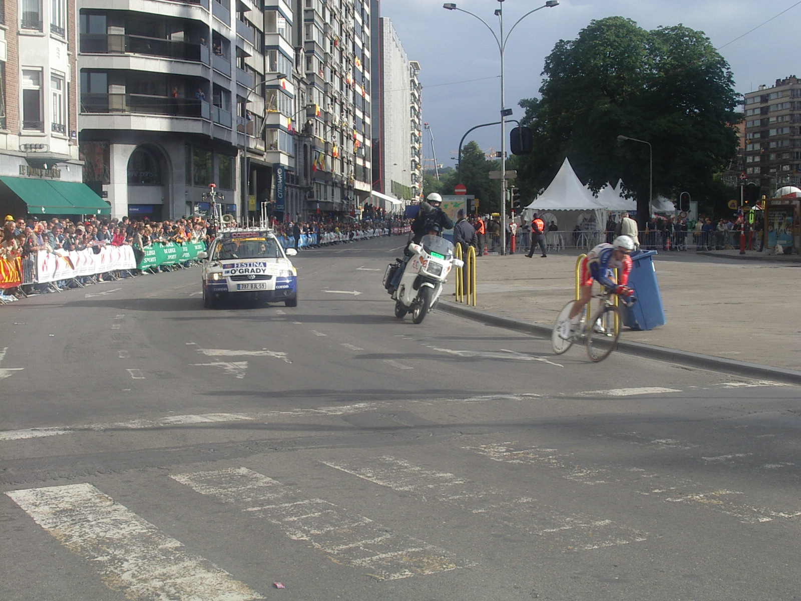 Prolog der Tour de France 2004 in Luettich